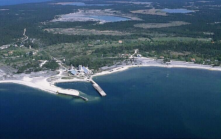 Kalkugnarna i bildens mitt. Kustremsan naturreservat. Motiv: Fleringe 94:1-7 Nyckelord: Flygbilder, Naturreservat, Riksintressen Kategori: Utv malm/mineral, Naturreservat Kalkugnarna i bildens mitt. Kustremsan naturreservat. Fleringe 94:1-7.